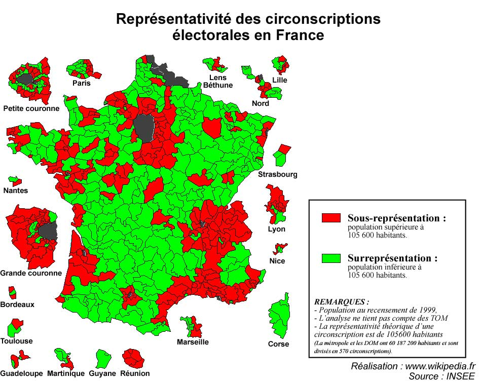 Carte des circonscriptions législatives françaises (hors TOM) avec leur représentativité (sous-resprésentation ou surreprésentation)